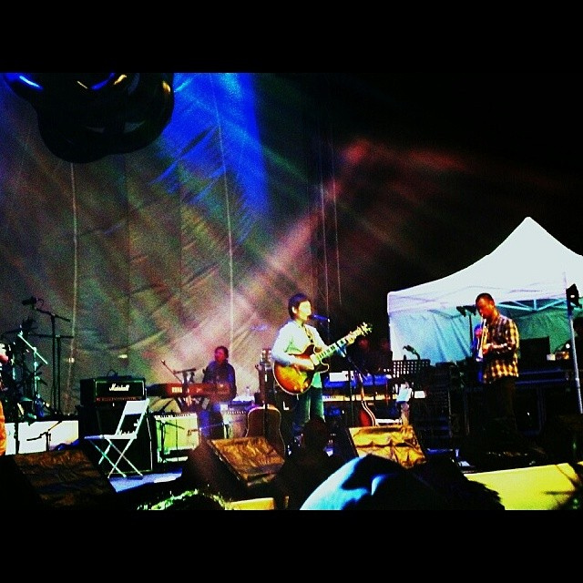 中文（中国大陆）: 万能青年旅店香港演出 由flickr用户yuen yan 拍摄